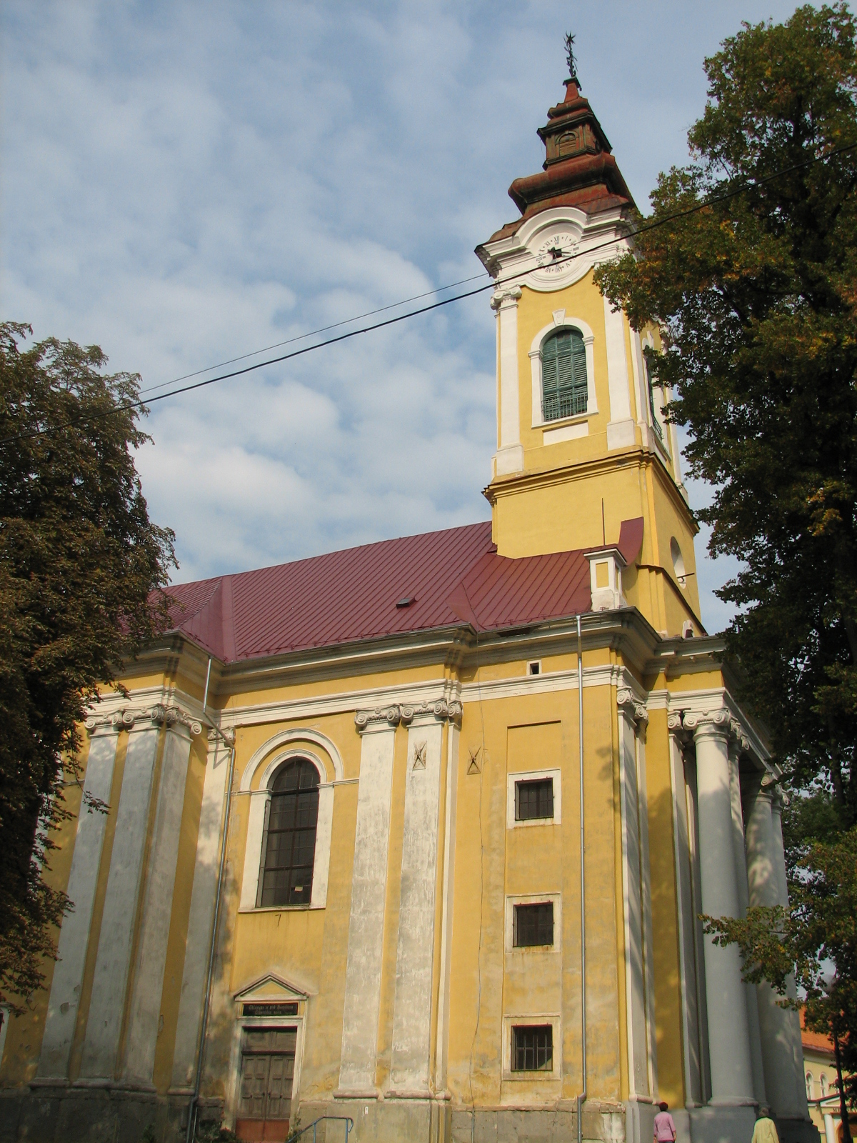 Tisovec (okr. Rimavská Sobota) - evanjelický kostol